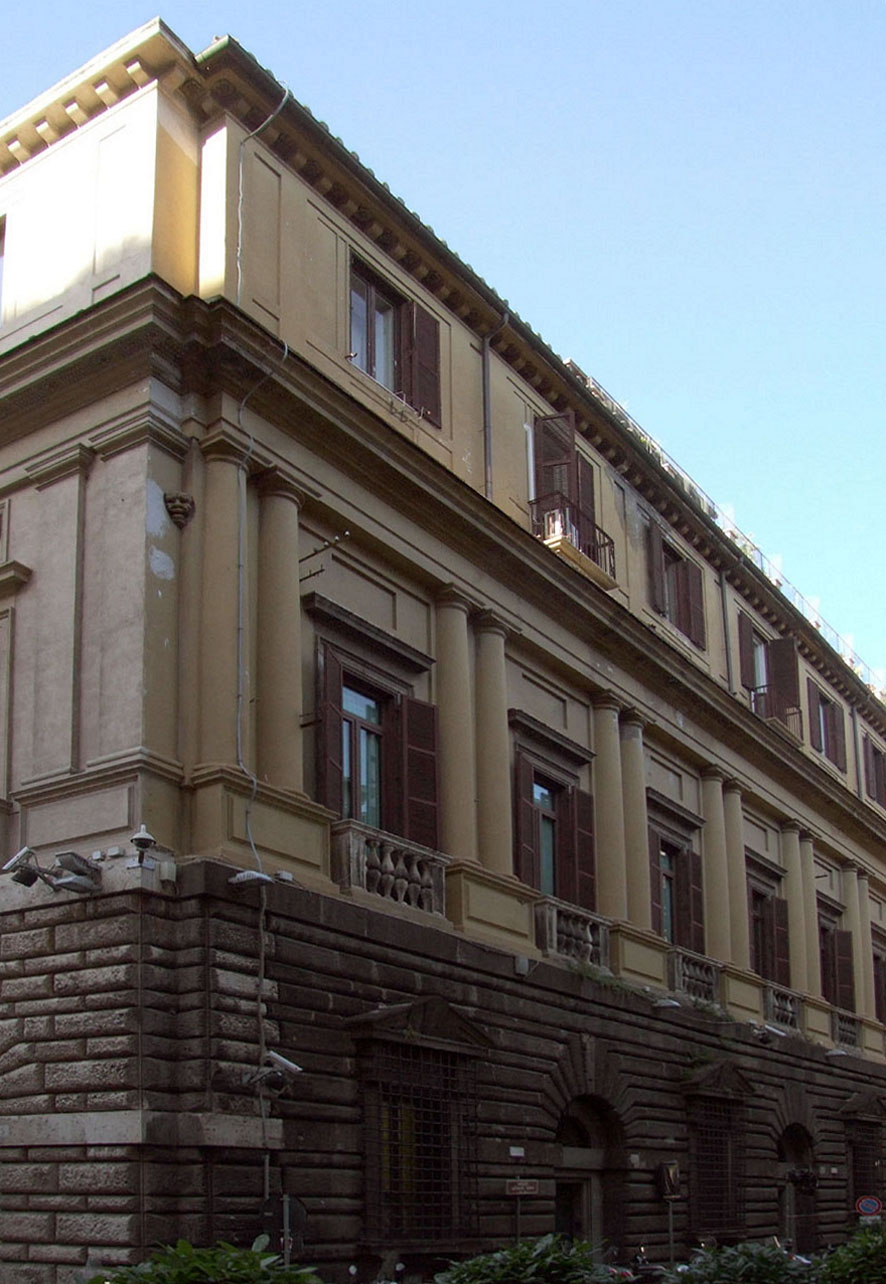 Palazzo Vidoni, facciata in via del Sudario, Roma